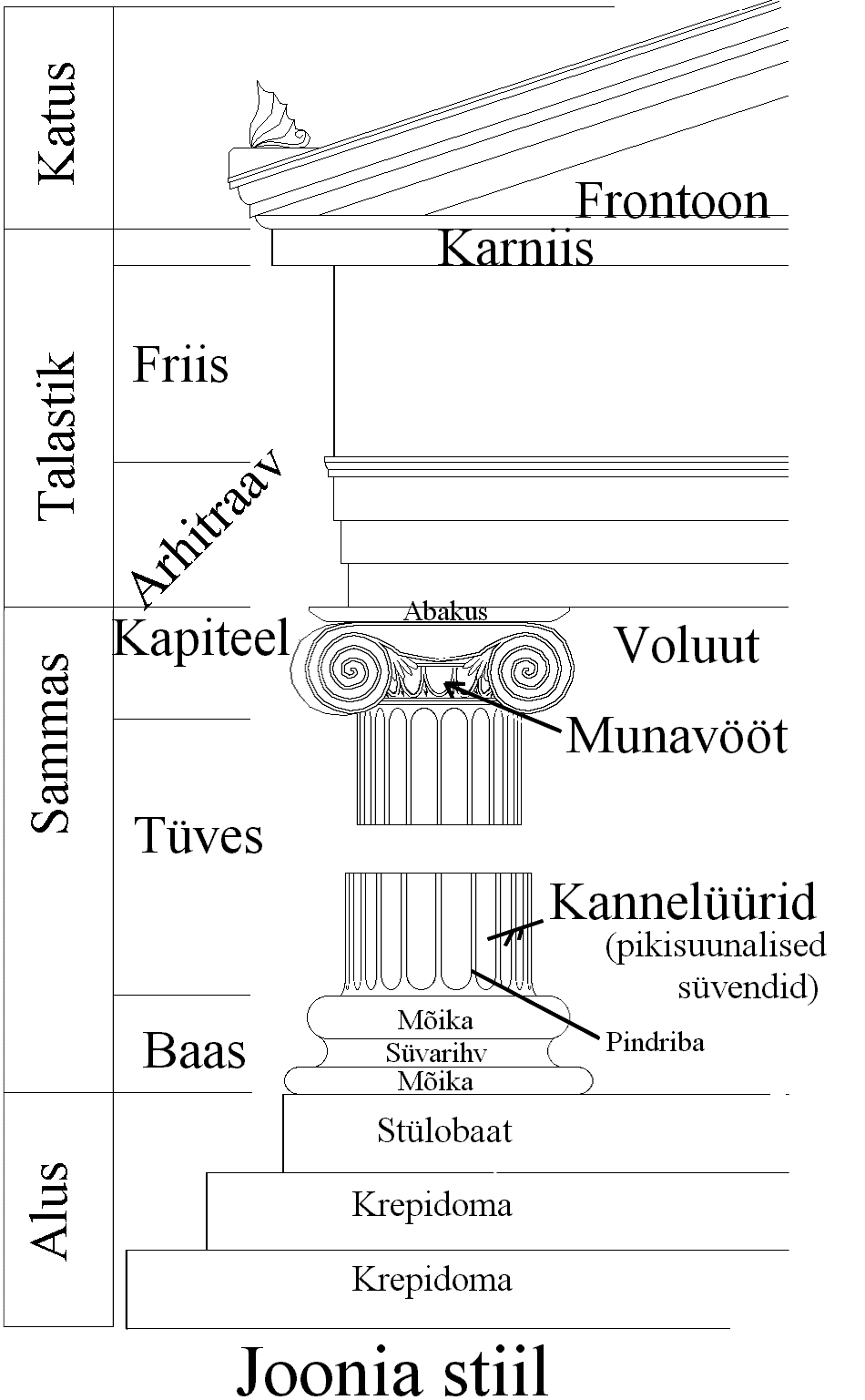 Joonia stiilis sammas kirjeldustega. Tõlgitud versioon pildist Image:Orden_jonico.gif Translated verson of image Image:Orden_jonico.gif